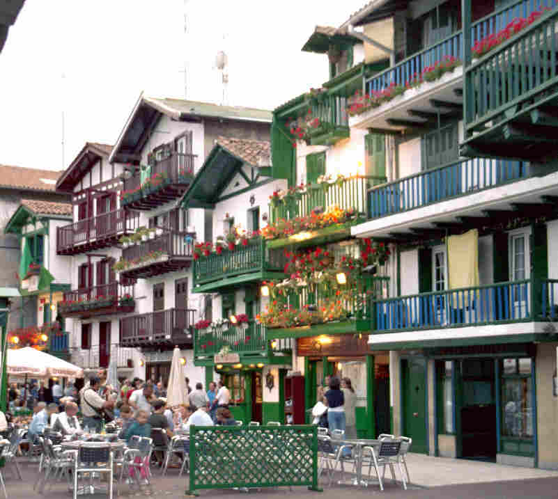 Casas típicas del barrio de los pescadores en Hondarribia - Fuenterrabía en la provincia de Guipúzcoa, (España).